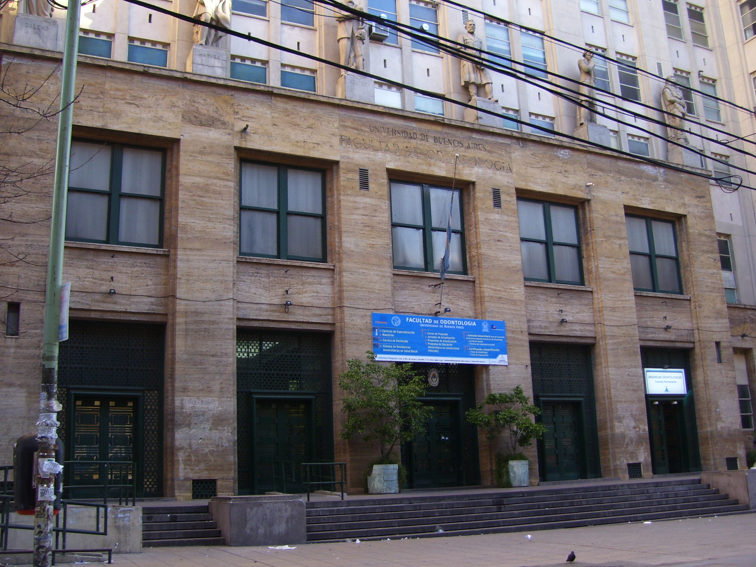 Facultad de Odontología. Universidad de Buenos Aires